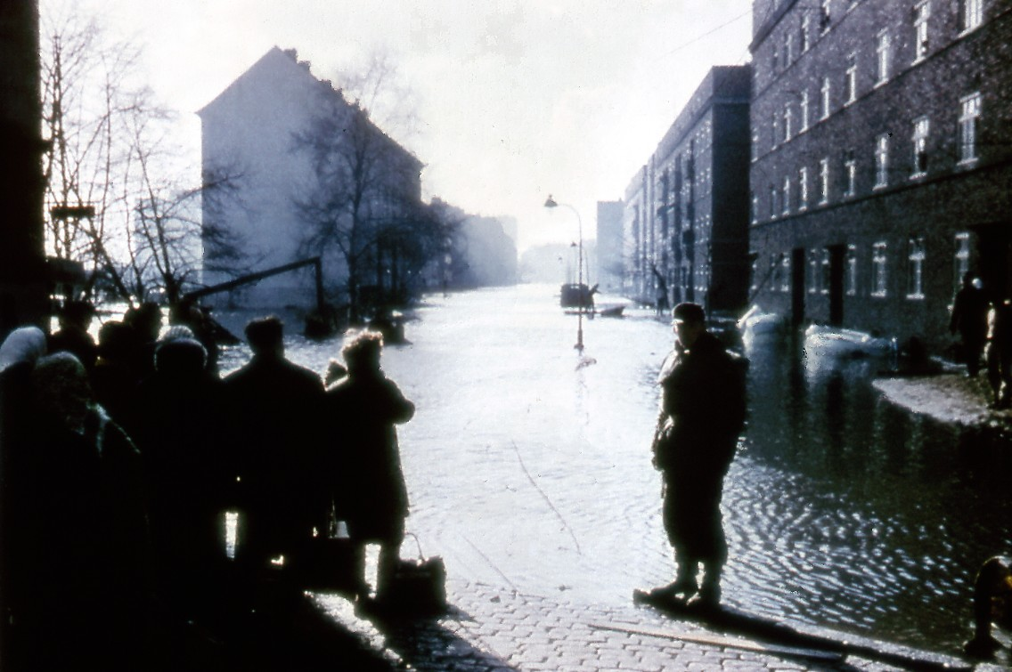 Sturmflut 1962 in Wilhelmsburg